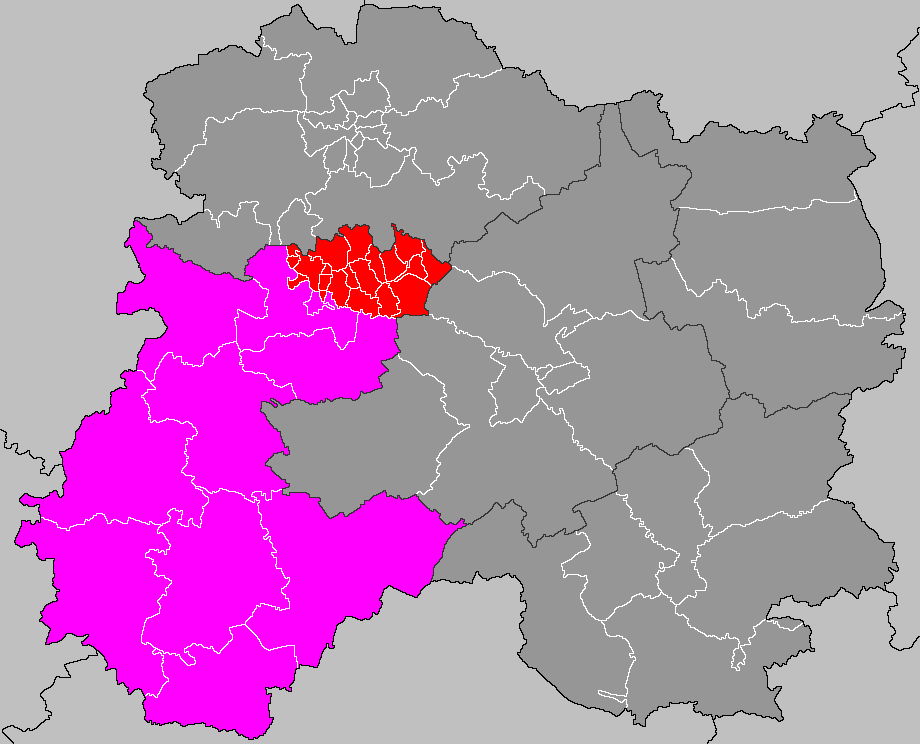 Localisation du canton d'Ay